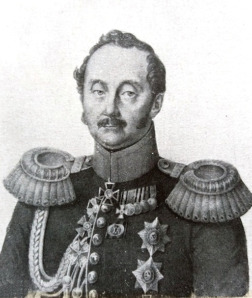 Шипов, Сергей Павлович